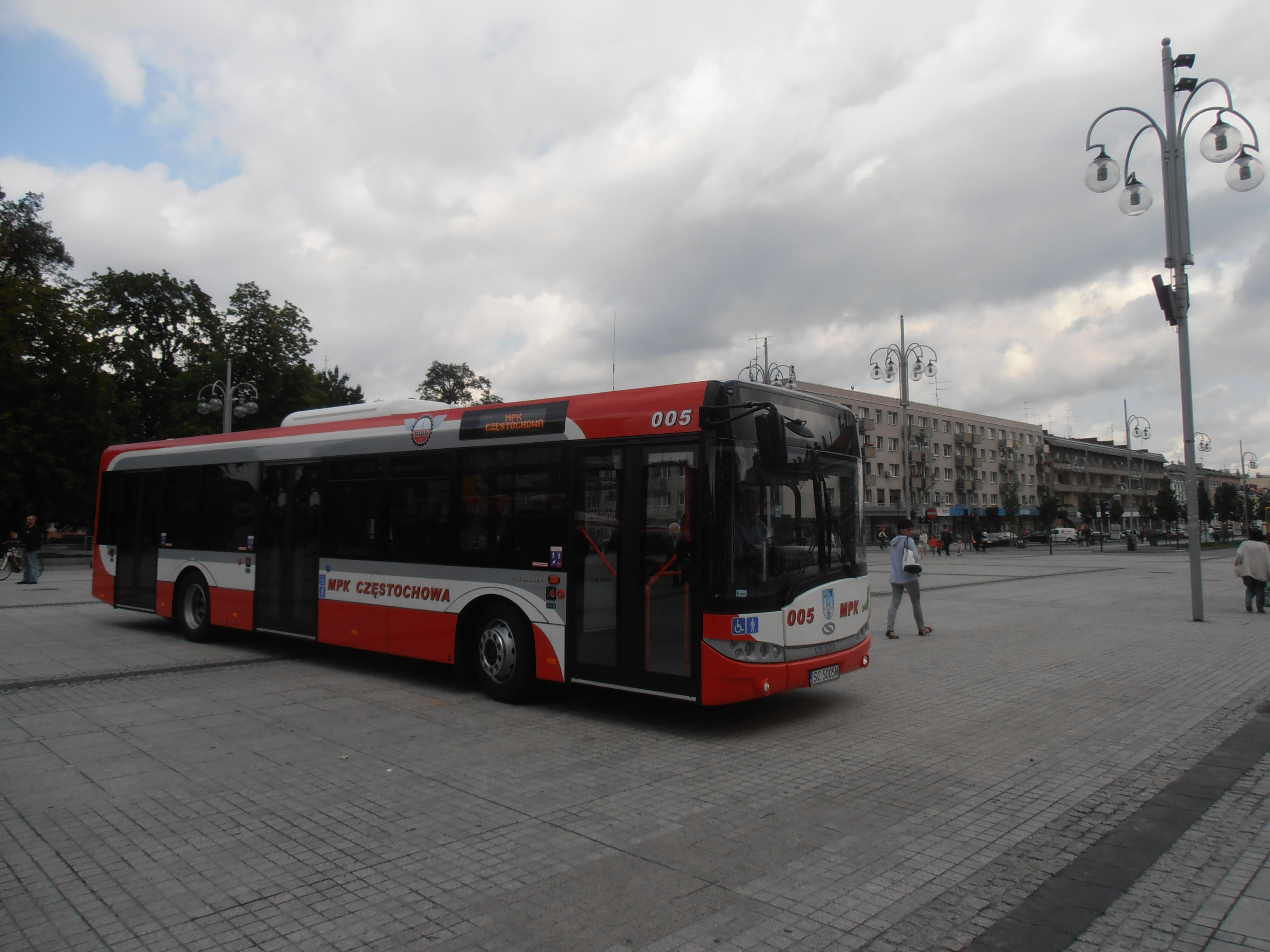 Solaris Urbino 12, Plac Biegańskiego, Częstochowa, prezentacja